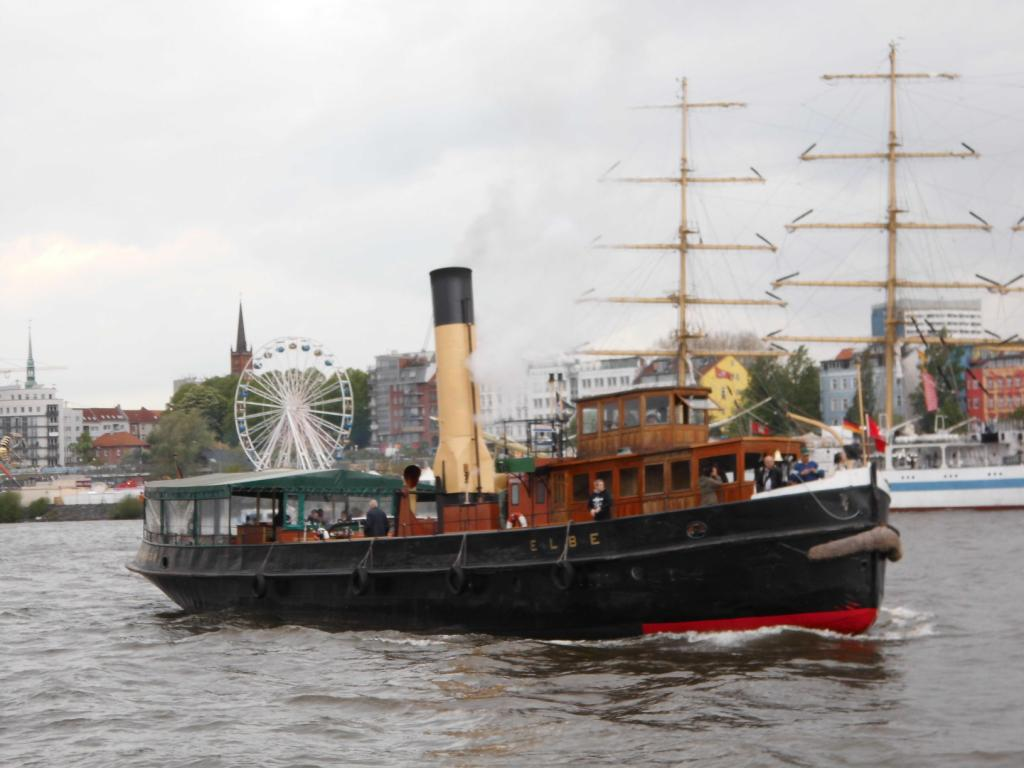 Historischer Flußeisbrecher Elbe